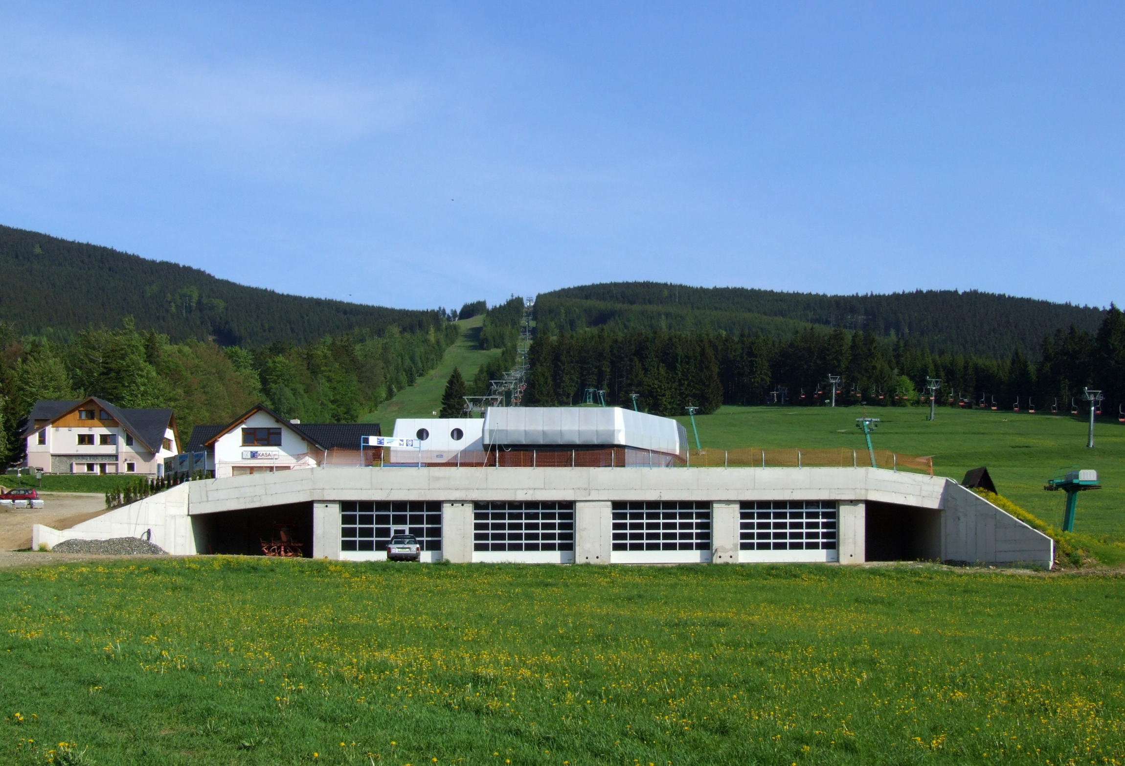 Lanová dráha Ramzová - Šerák (Úsek Ramzová – Čerňava) v květnu 2011